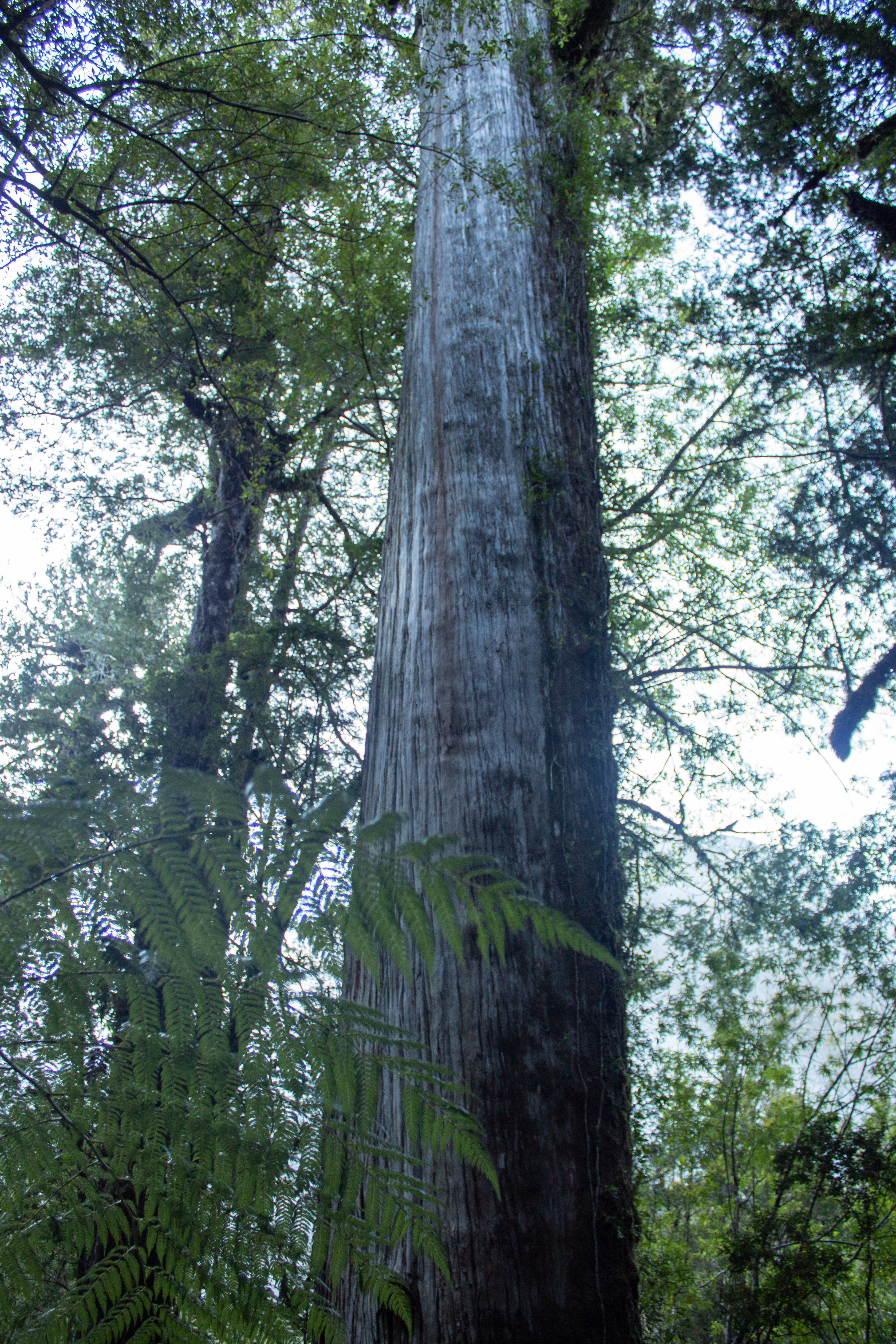 Alerce Vivo, Parque Nacional Alerce Andino. Región de Los Lagos, Chile.